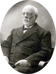 Кузнецов, Александр Харитонович